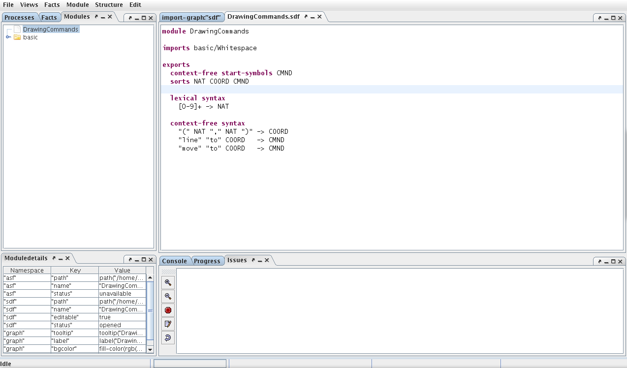 Tela contendo especificação de uma gramática básica utilizando o ASF+SDF Meta Environment.